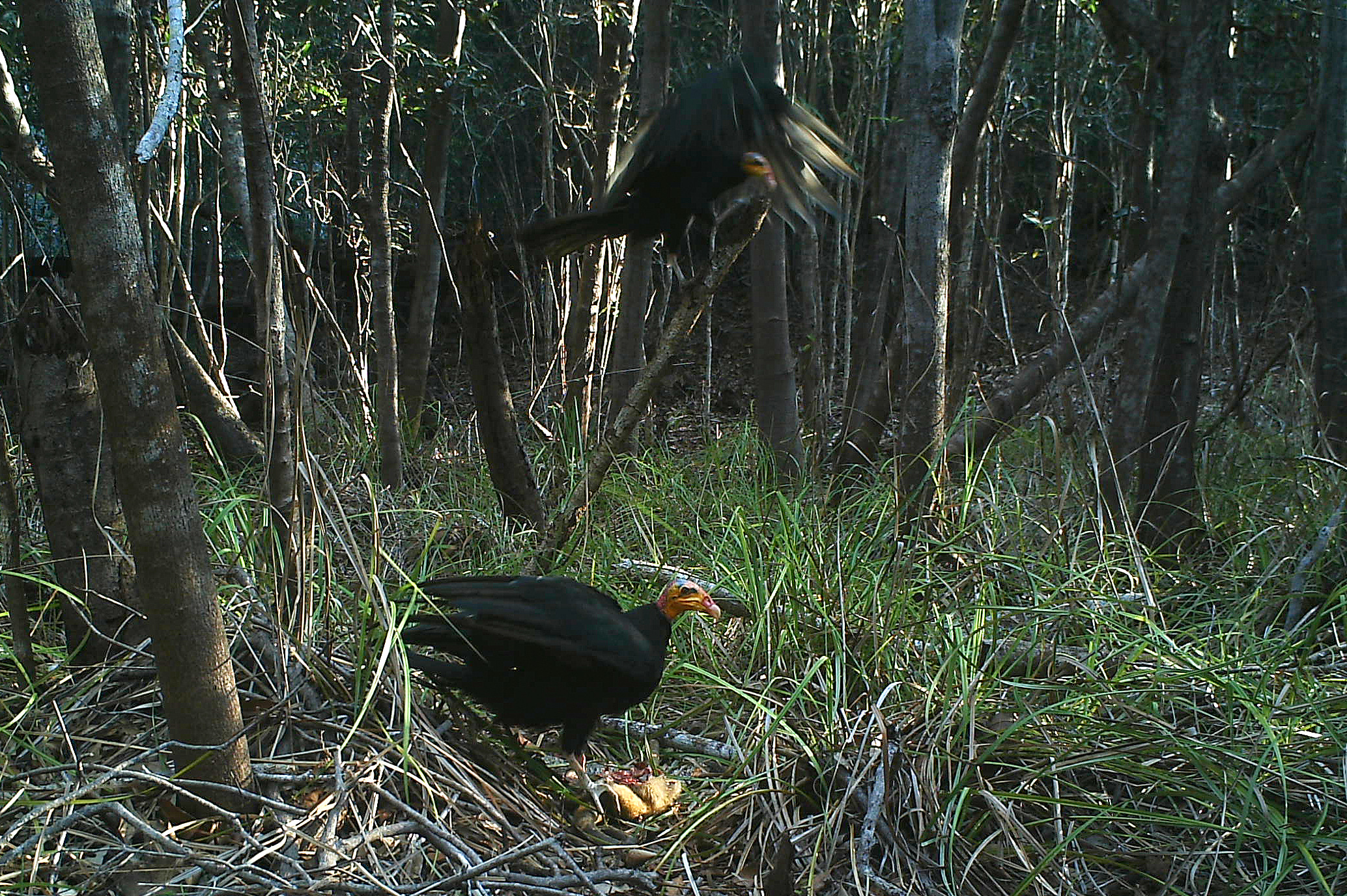 Großer Gelbkopfgeier (Cathartes melambrotus)